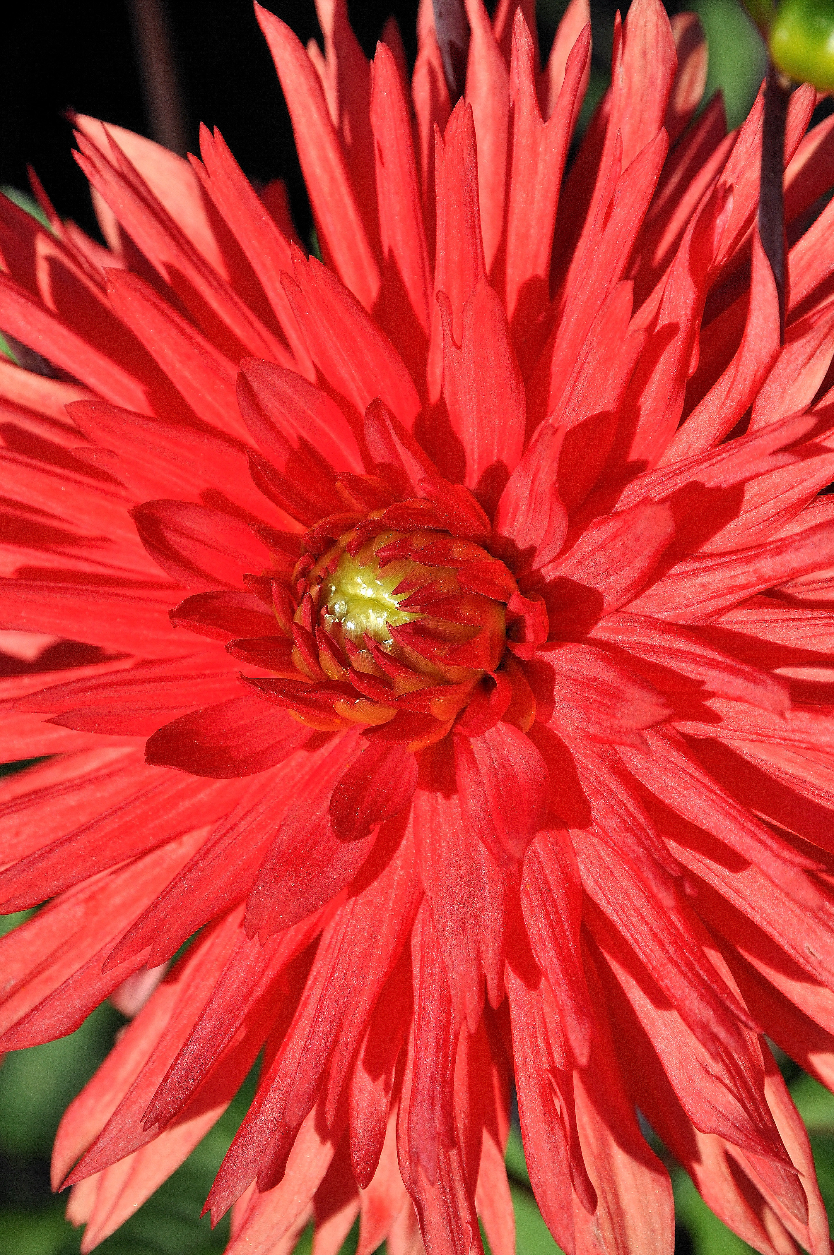 Splendide dahlia cactus